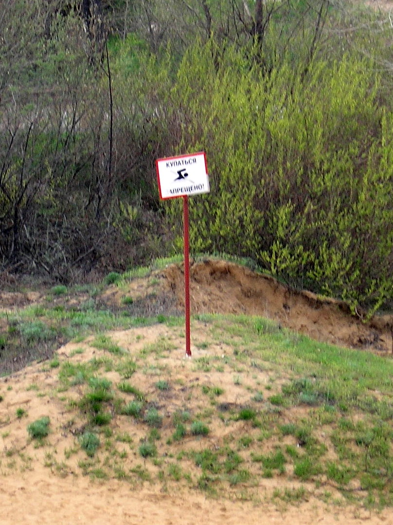 Озеро Пляжное, Тольятти, Россия